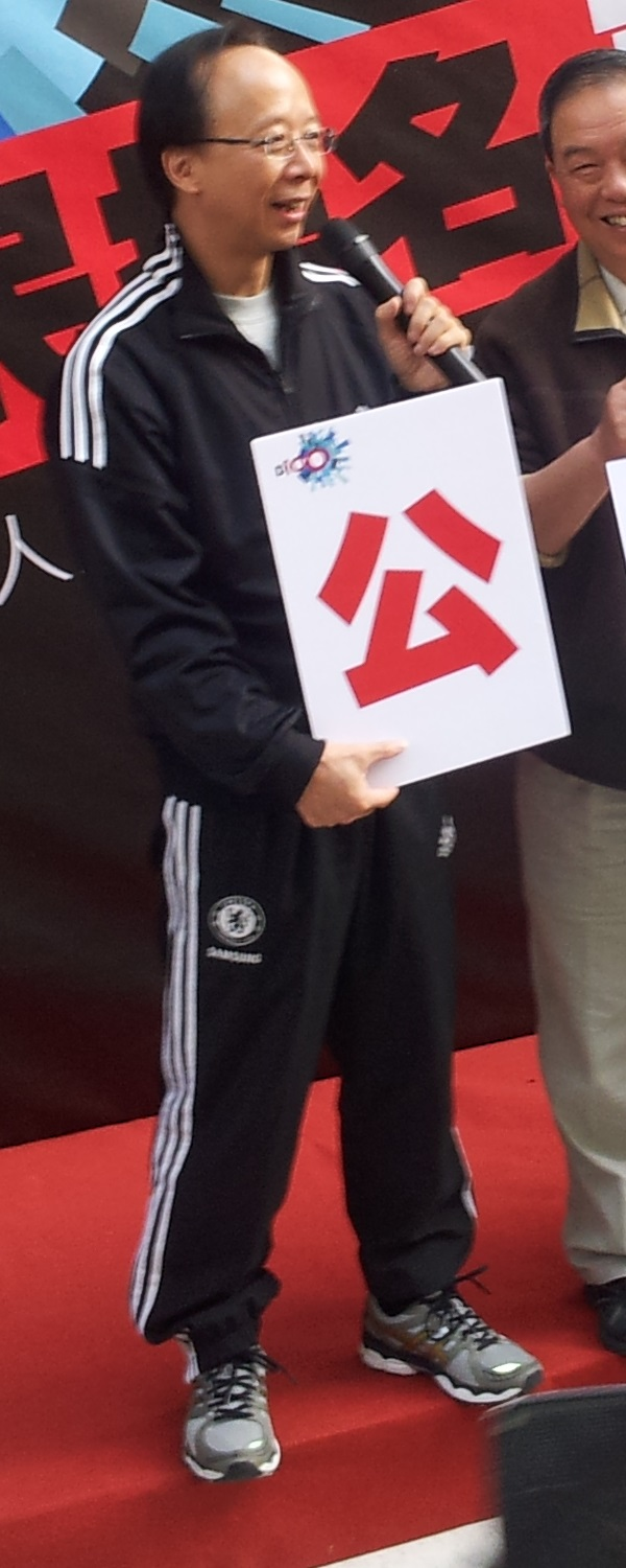 中文（香港）: 李錦洪